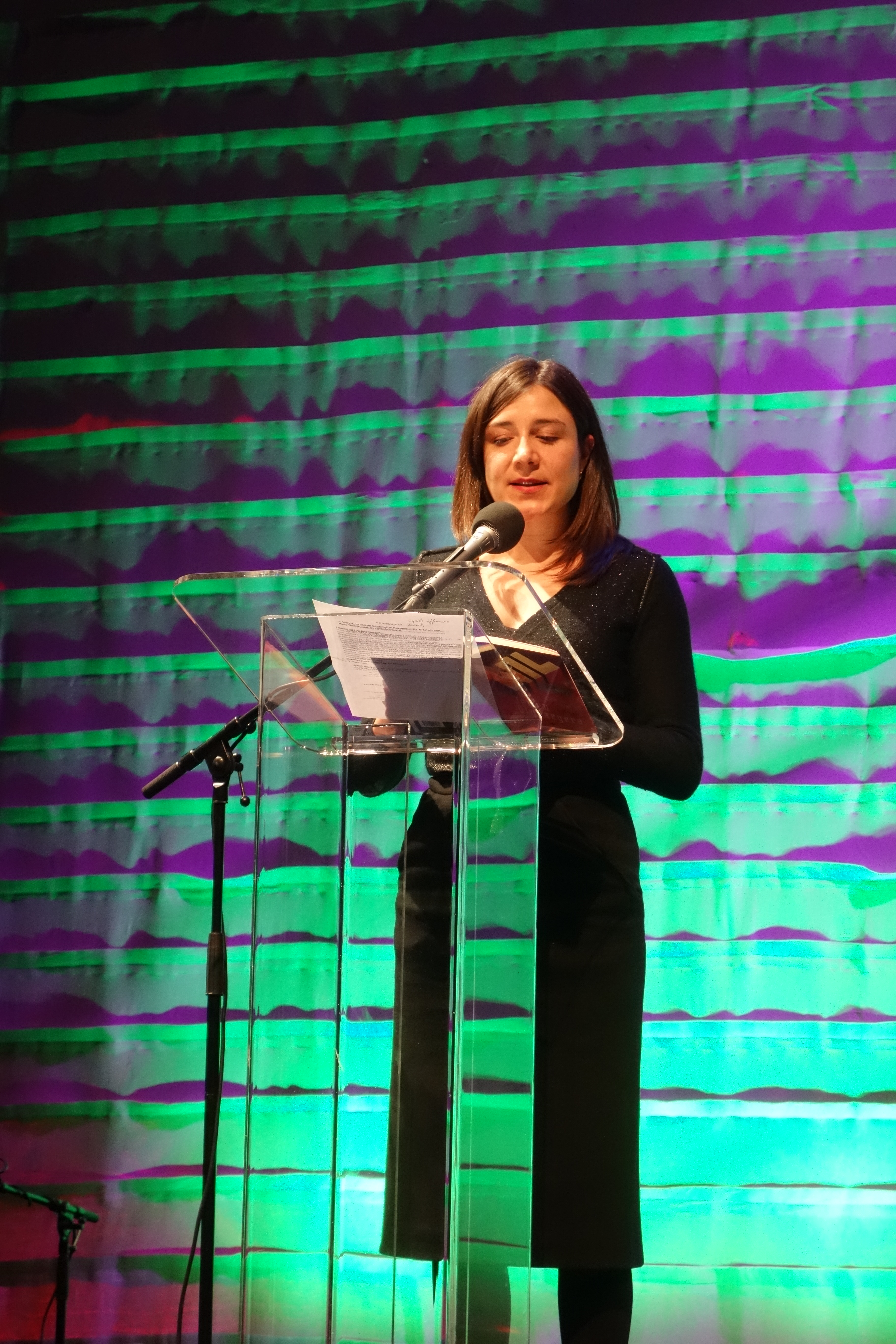 Alejandra Theus tijdens Winternachten 2018 (Writers Unlimited), Den Haag.